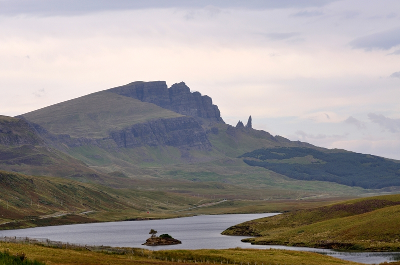 Old man of Storr, Isle of Skye